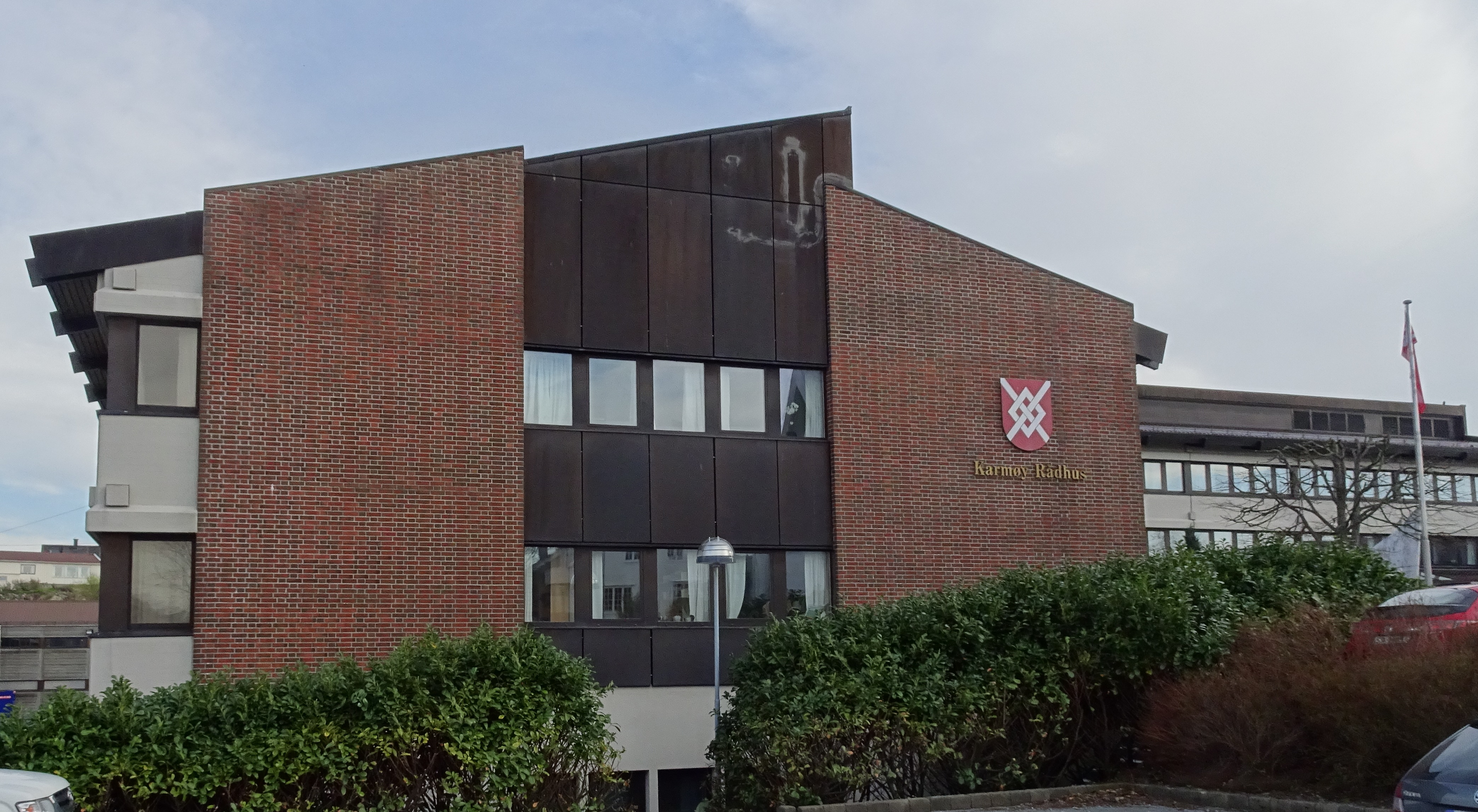 Karmøy rådhus i Kopervik